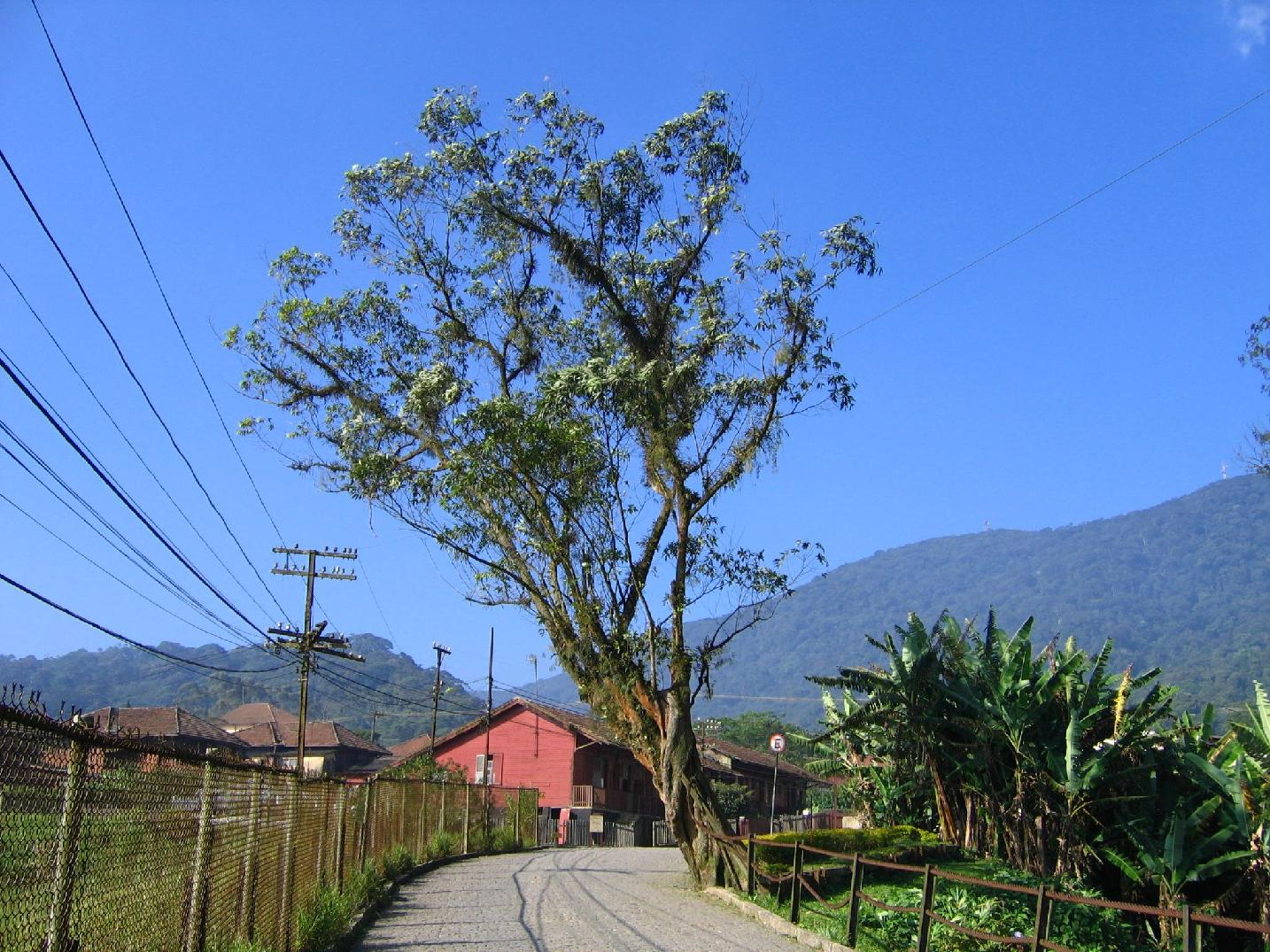 Pau da Missa